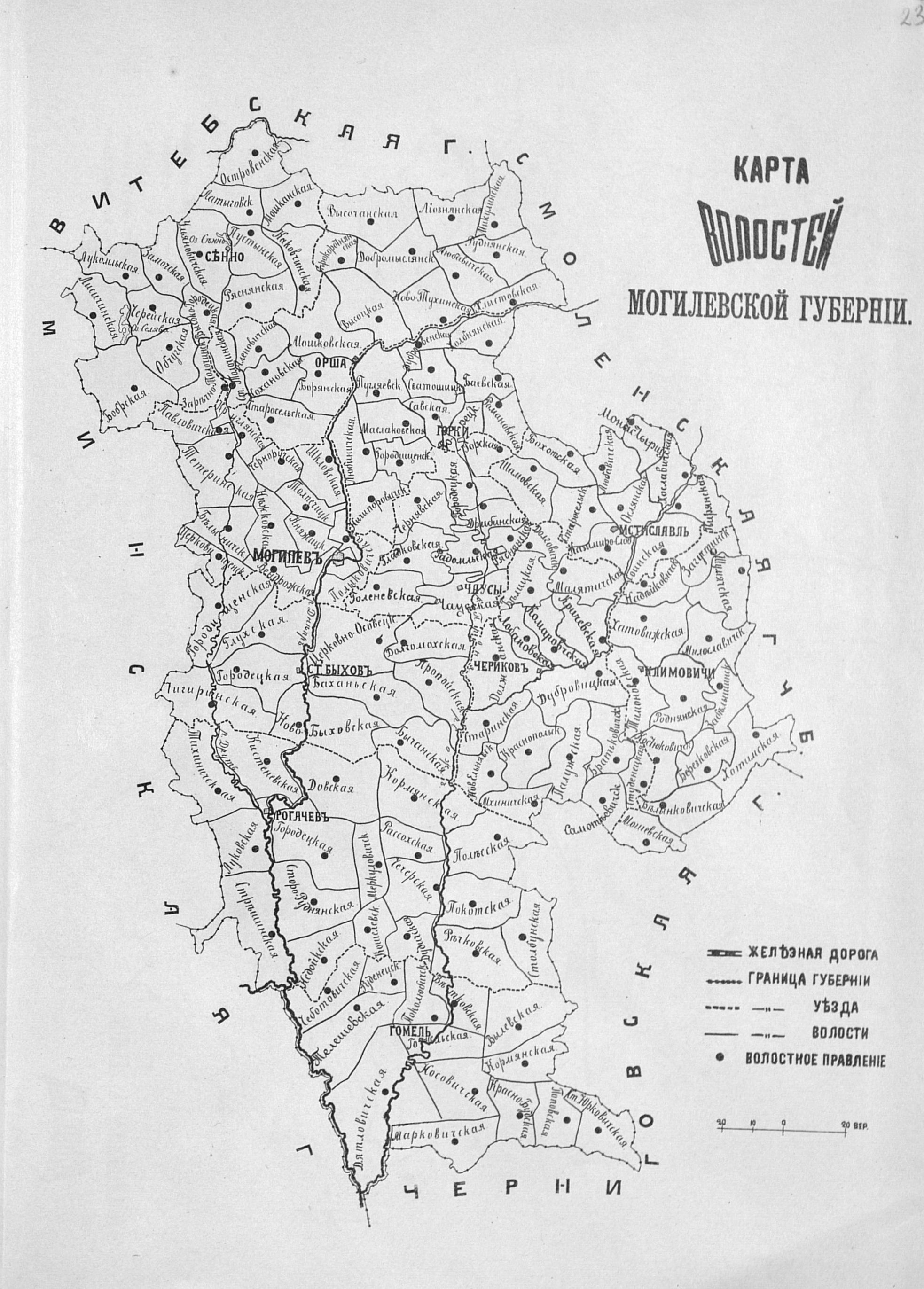 Карта волостей Могилёвской губернии